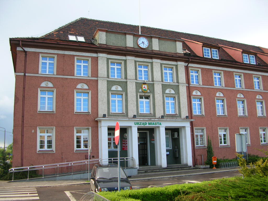 Piła - Ratusz siedziba Urzędu Miasta Autor - Bartek Wawraszko